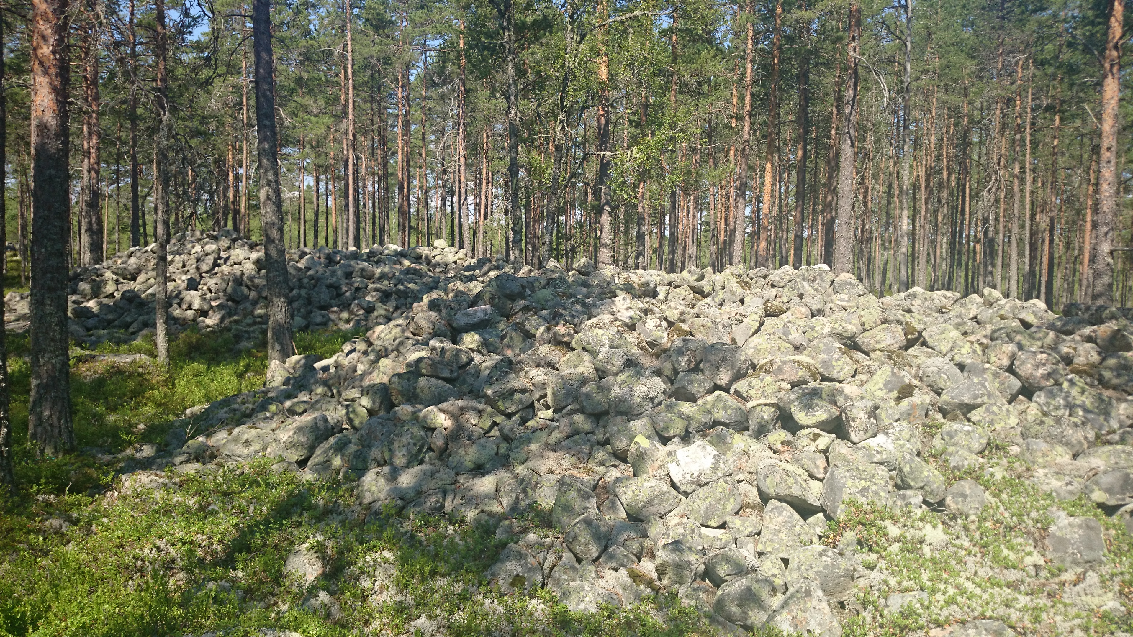 Högarna, gravfält